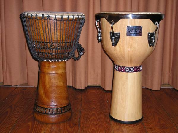 Dit zijn mijn eigen djembé's.